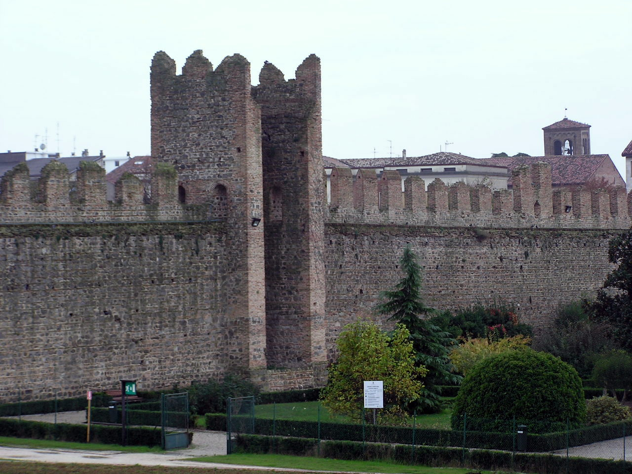 Este - Castello Carrarese